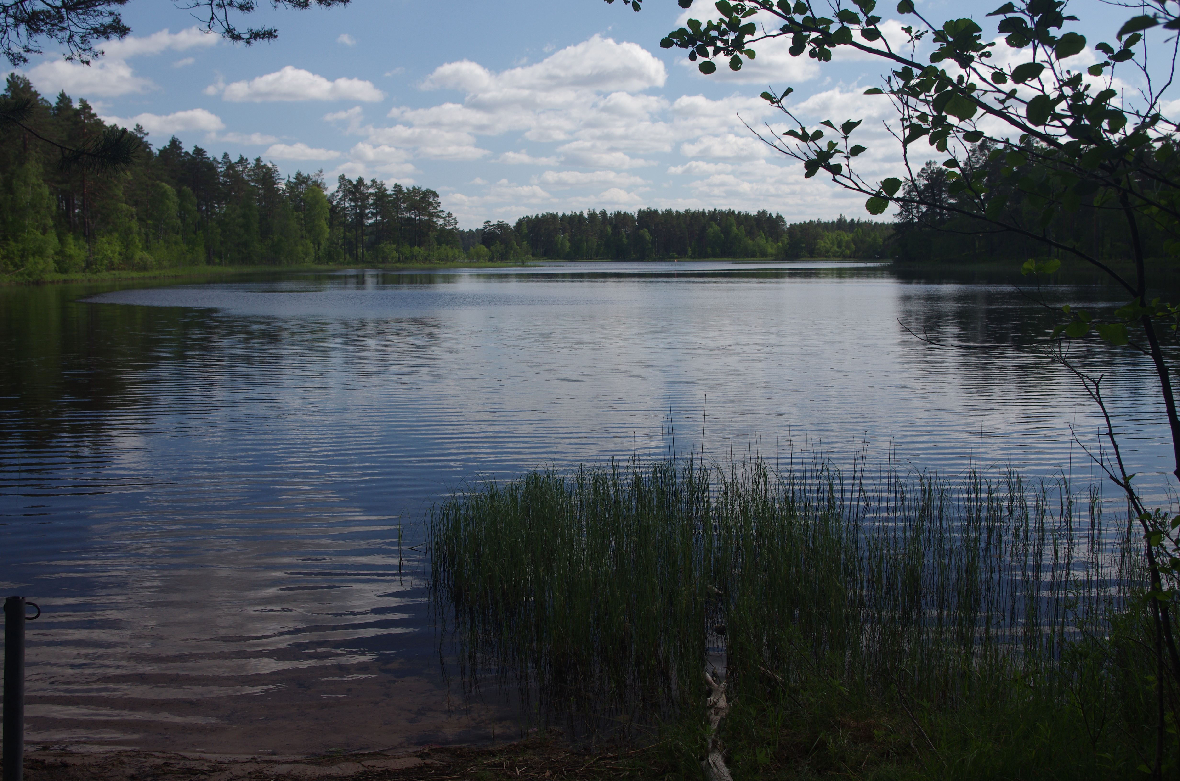 Sjön Nordvatten på Hökensås i Tidaholms kommun. Sjön är en fiskesjö och en häckningsplats för storlom.